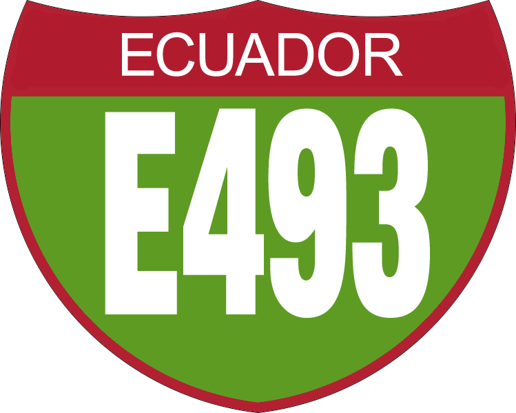 Disco de Identificación Ruta E493